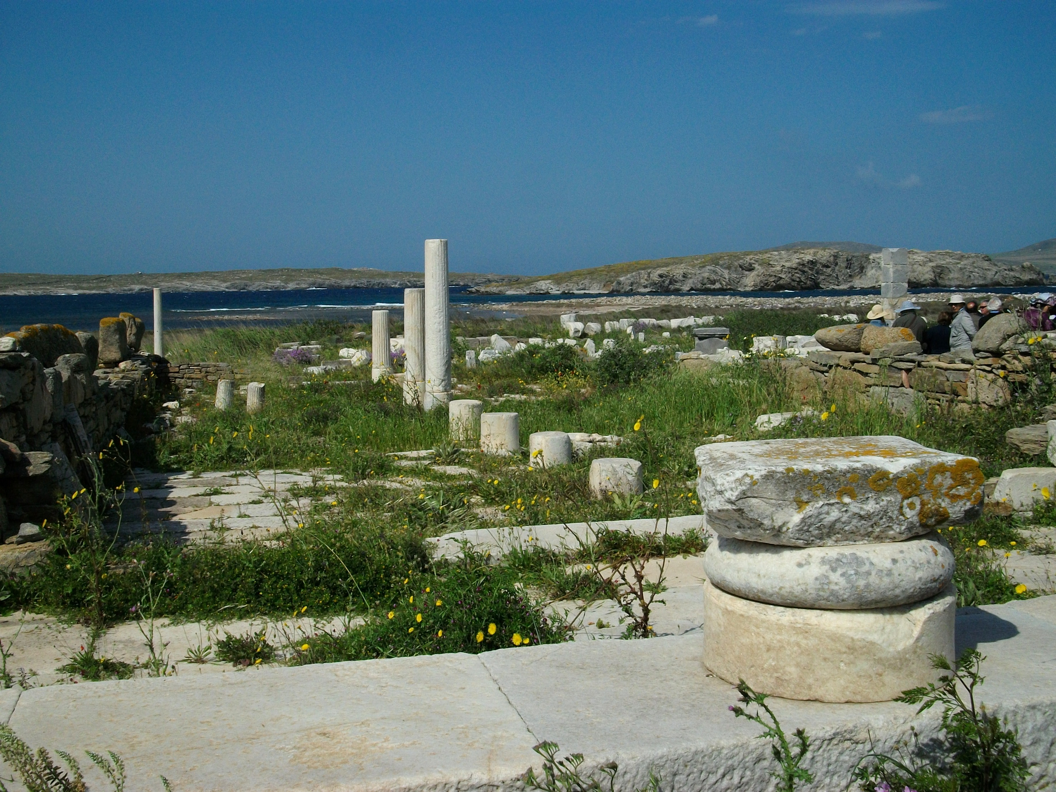 Casa (Oikos) dels Naxis a Delos.